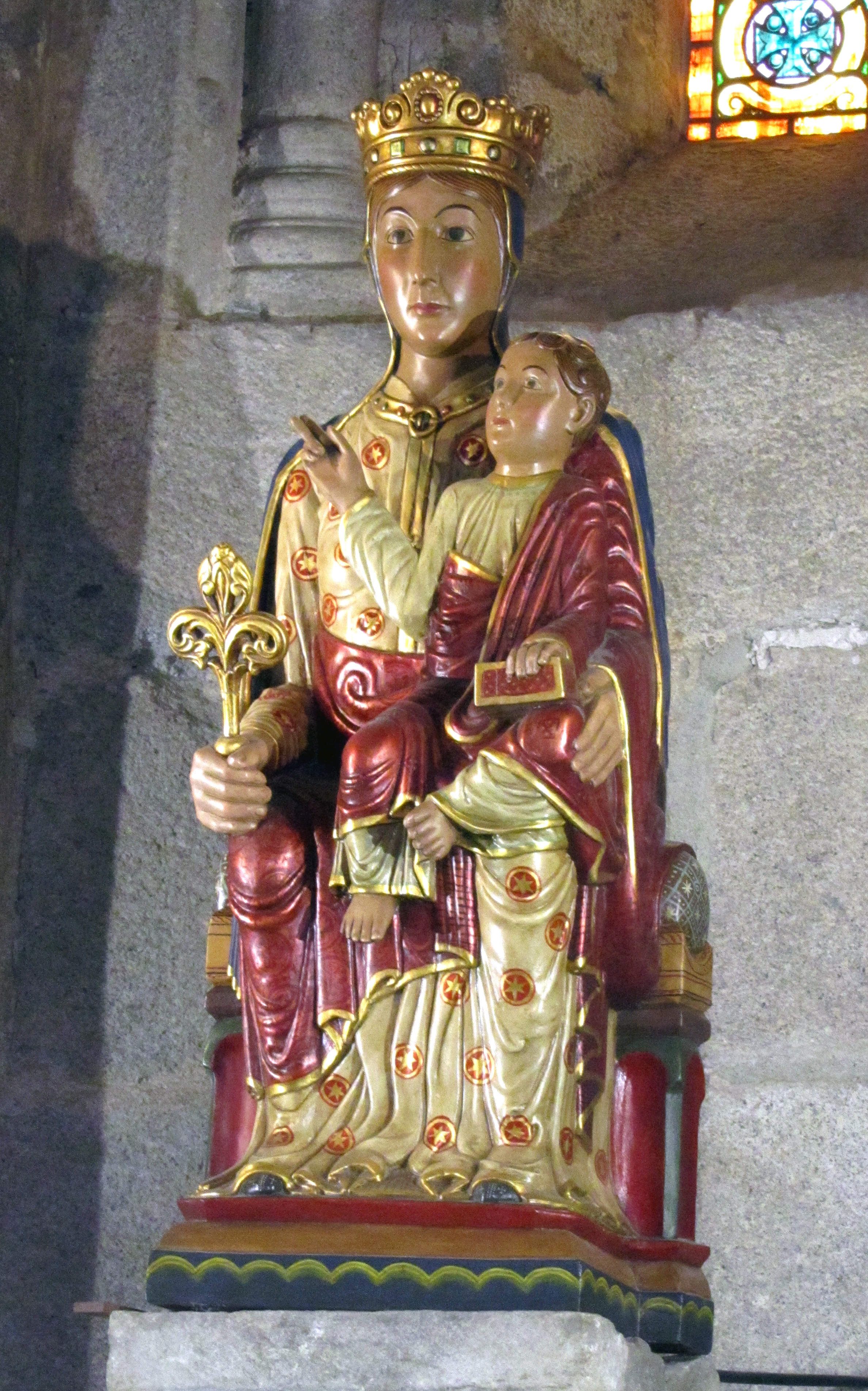 Nuestra Señora de Urgel, imagen expuesta en la catedral de la Seu de Urgel. Cataluña. Spain